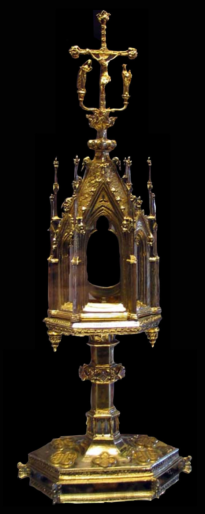 monstrans van 1218 afkomstig uit de abdij van Herkenrode